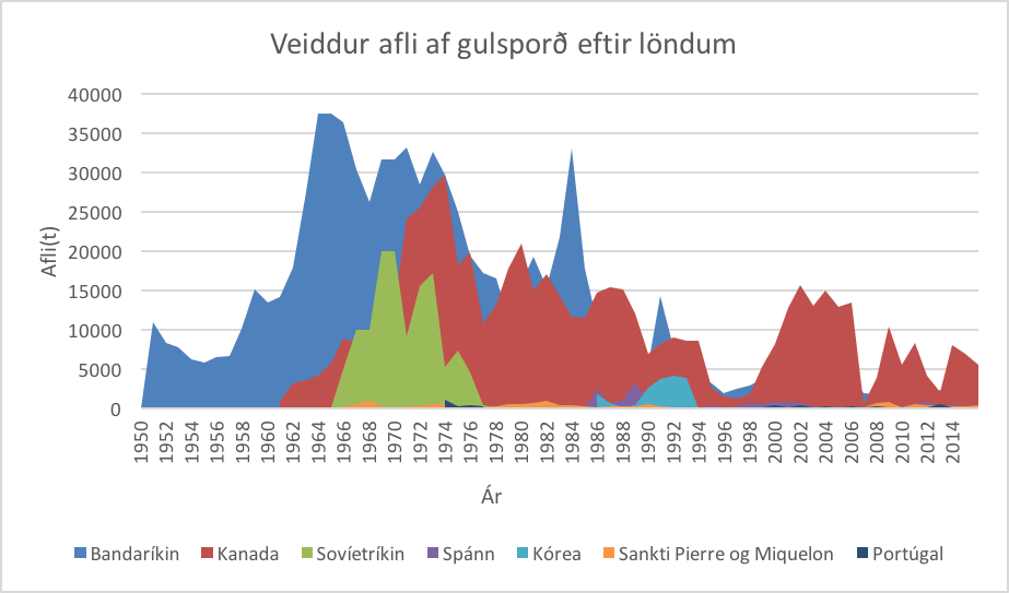 Stærstu veiðiþjóðir á gulsporði frá árinu 1950